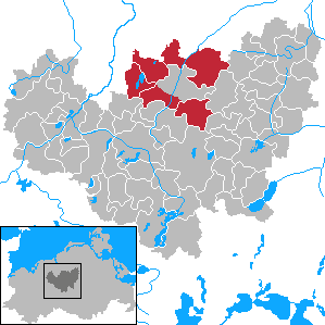 Former Amt Laage-Land in Mecklenburg-Vorpommern - District Güstrow